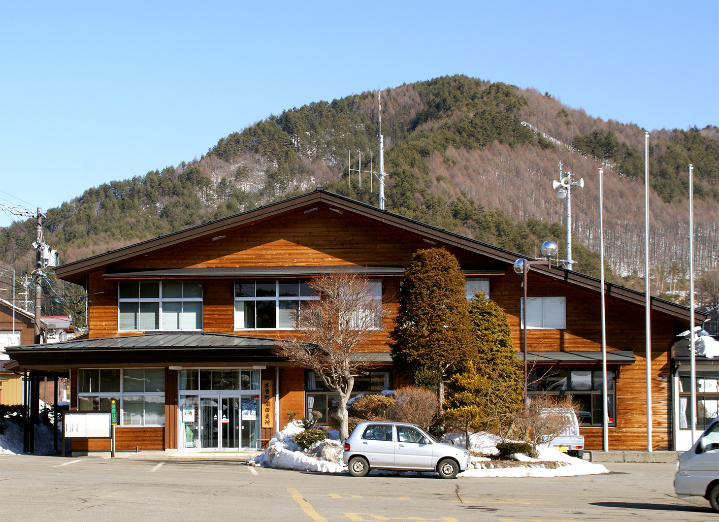 現木曽町開田支所